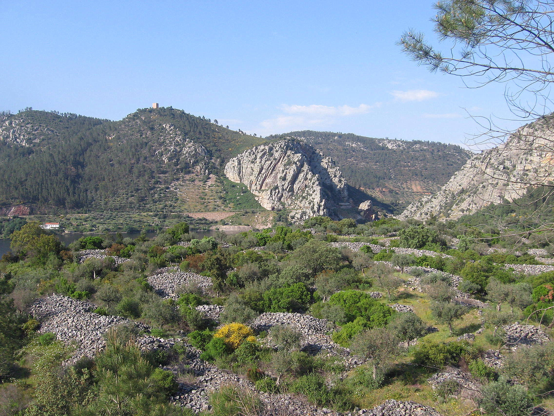 Conhal do Arneiro, Santana, Nisa, Portugal